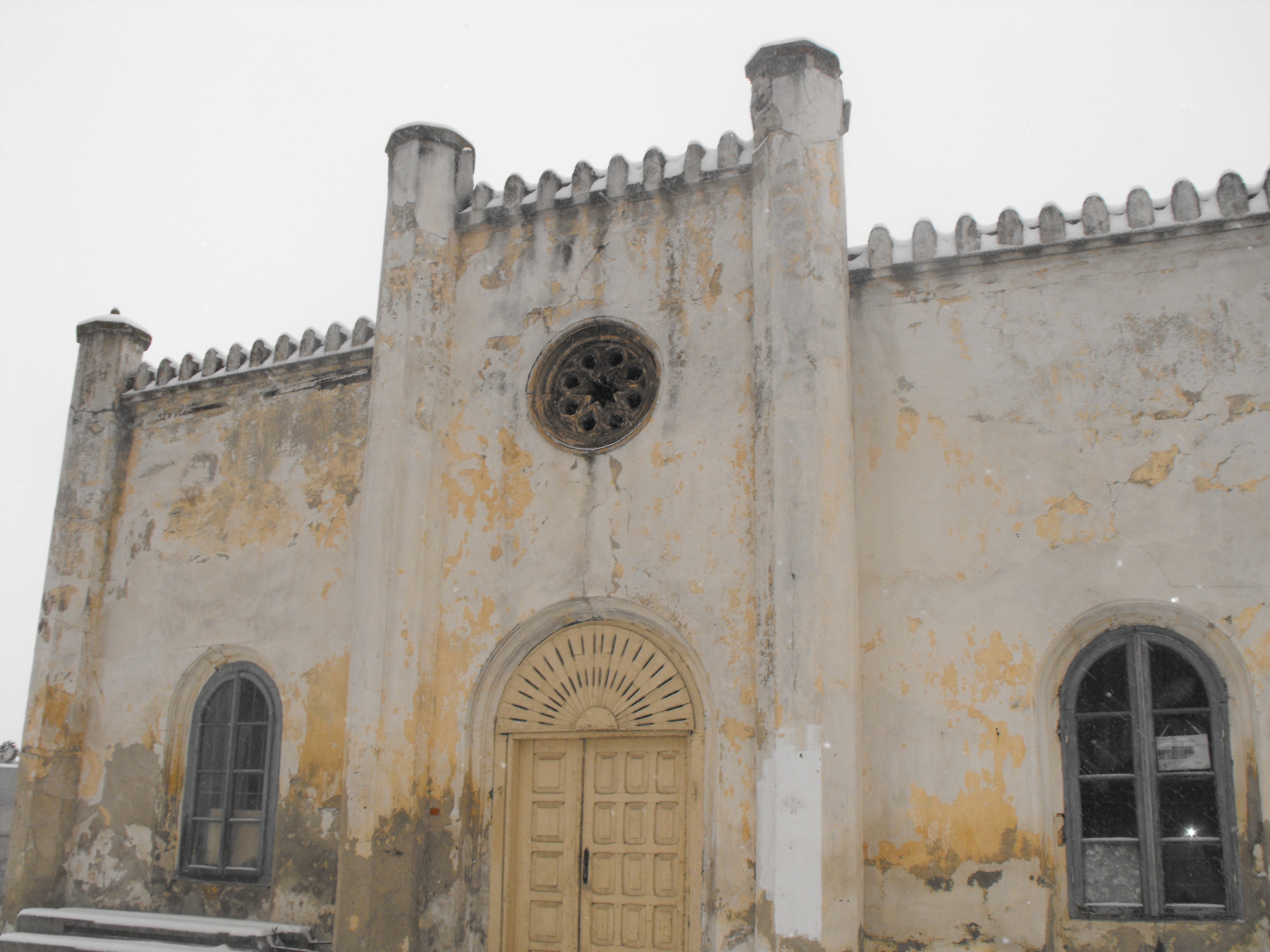 Casa-anexă 02